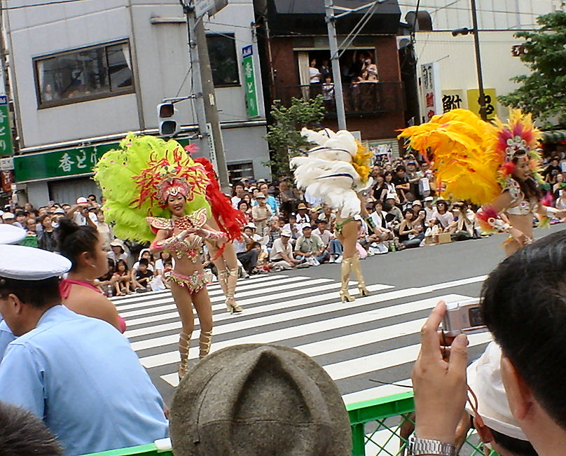 Asakusa Samba Carnival, Tokyo